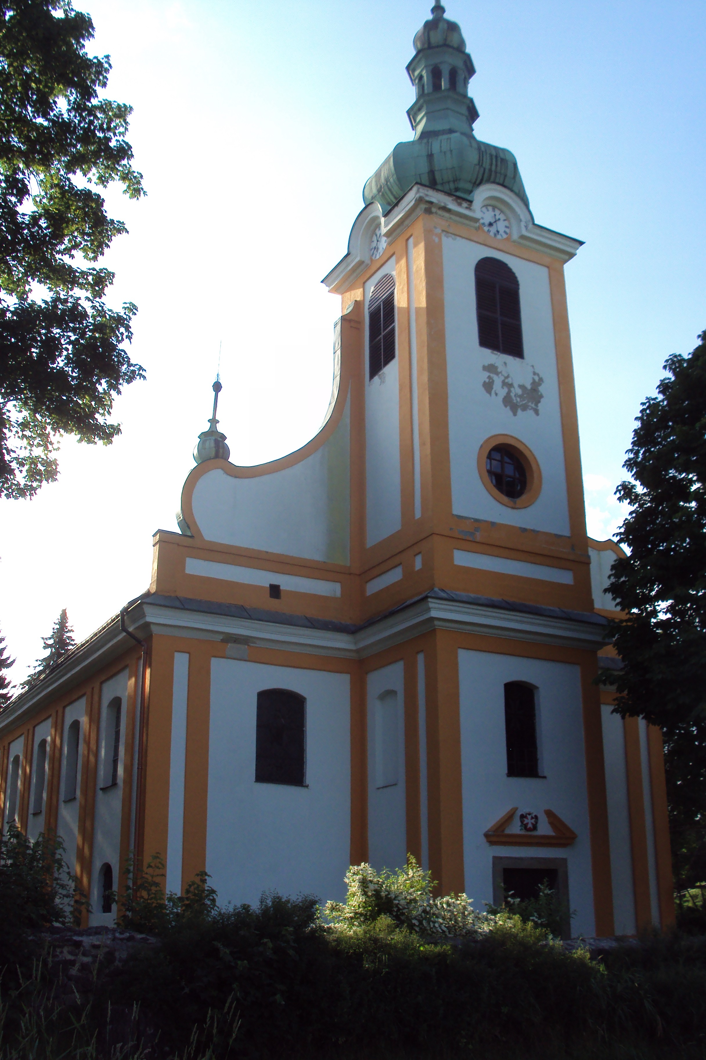 Česky: Barokní kostel sv.Anny